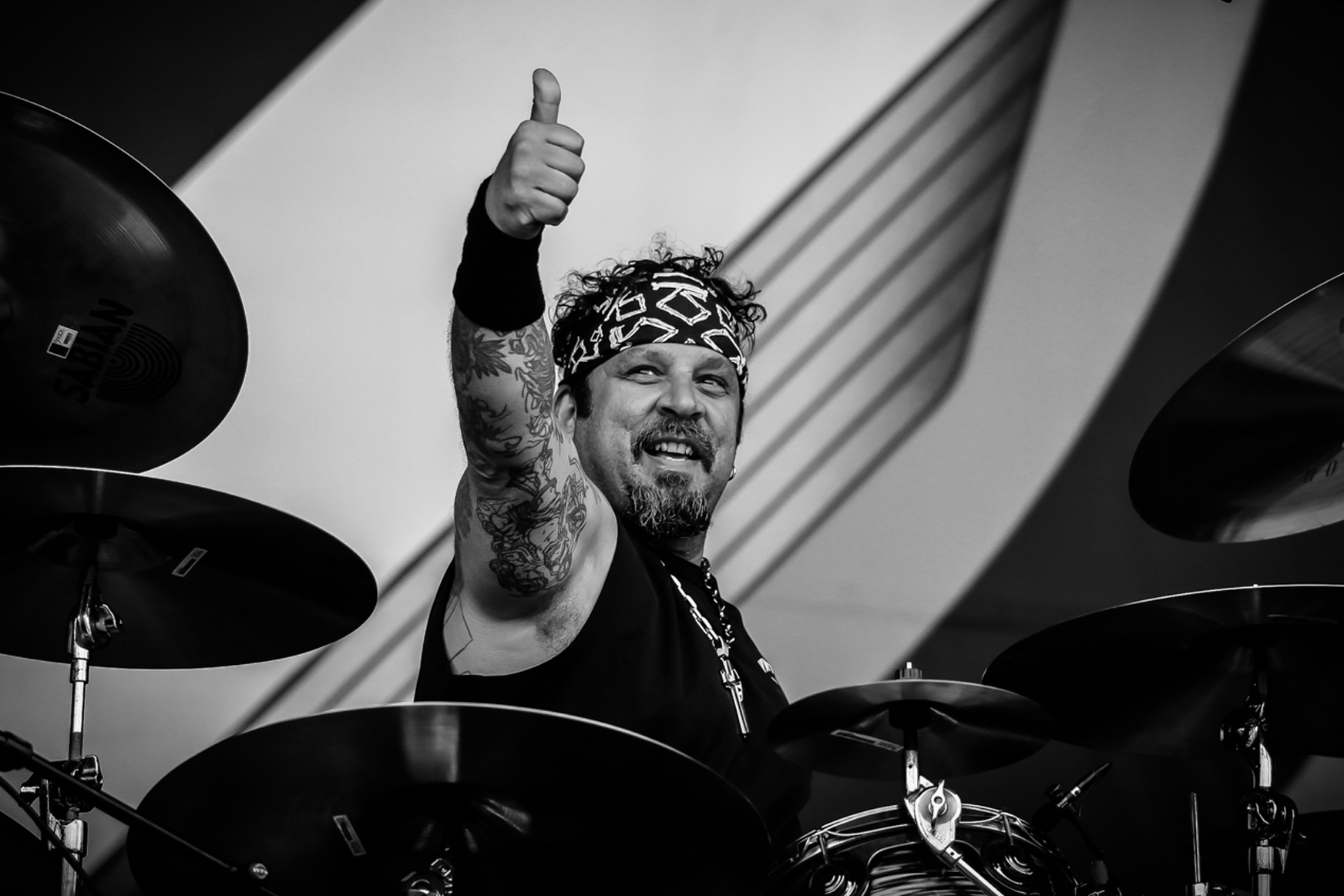 Anthony Jude Pero, drummer voor Twisted Sister en Adrenalin Mob